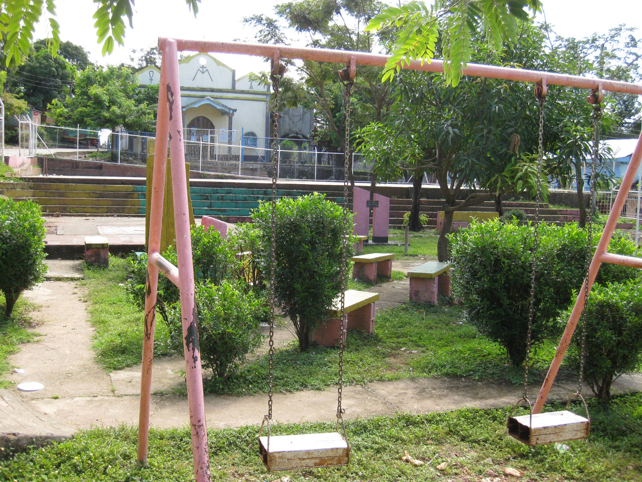 Parqur municipal del pueblo.